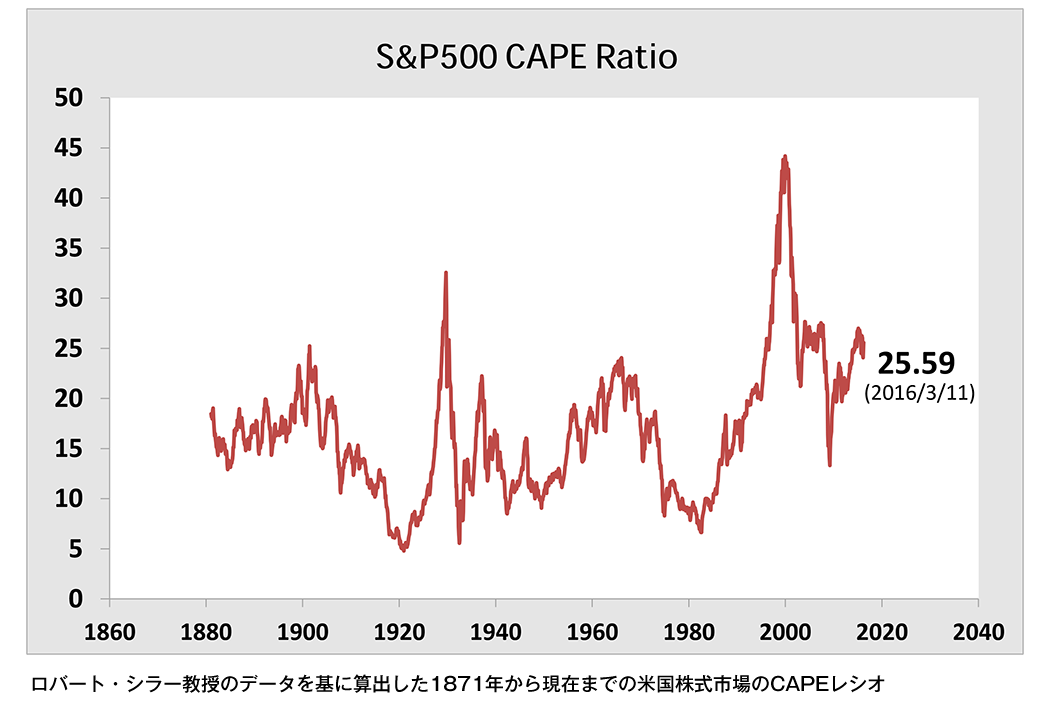 ロバート・シラー教授のデータを基に算出した1871年から現在までの米国株式市場のCAPEレシオ